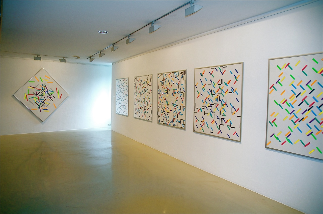 Ausstellung Edgar Knoop: Networks 2011, Städtische Galerie "Freihausgasse", Villach